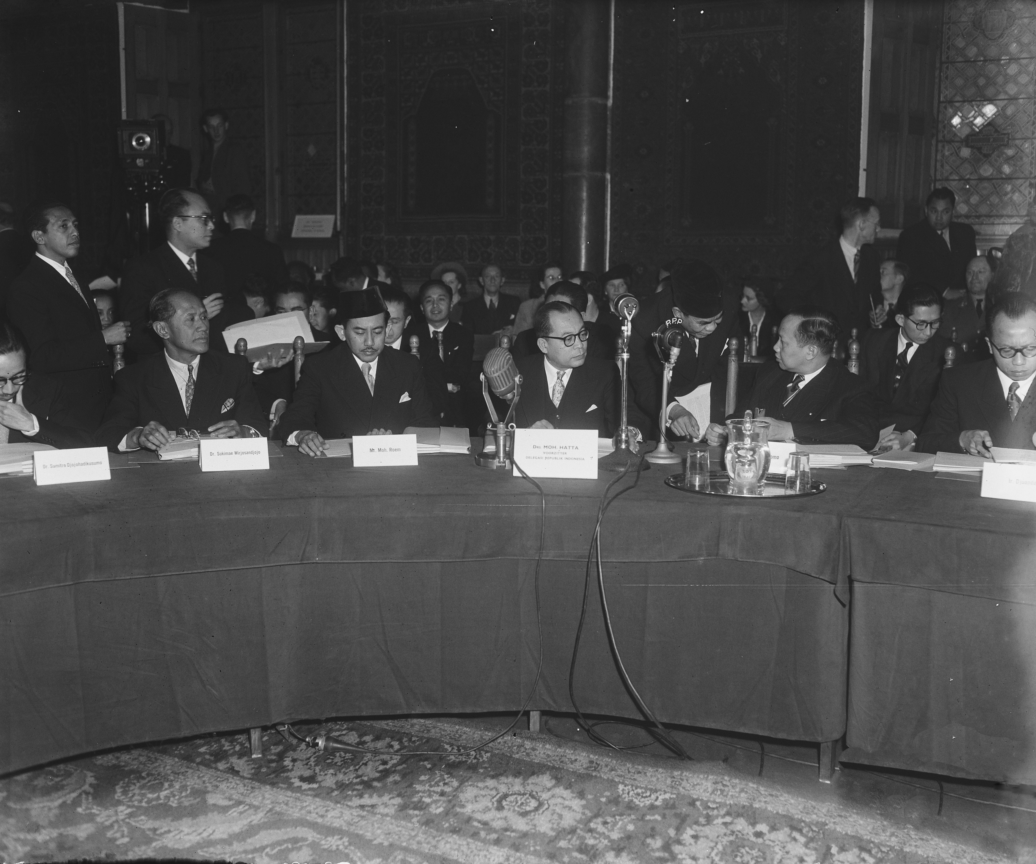 Collectie / Archief : Fotocollectie Anefo Reportage / Serie : [ onbekend ] Beschrijving : Ronde Tafel Conferentie , slotzitting in Ridderzaal, Mohamed Rum Datum : 2 november 1949 Trefwoorden : slotzittingen Instellingsnaam : Ridderzaal Fotograaf : Noske, J.D. / Anefo Auteursrechthebbende : Nationaal Archief Materiaalsoort : Glasnegatief Nummer archiefinventaris : bekijk toegang 2.24.01.09 Bestanddeelnummer : 903-6870